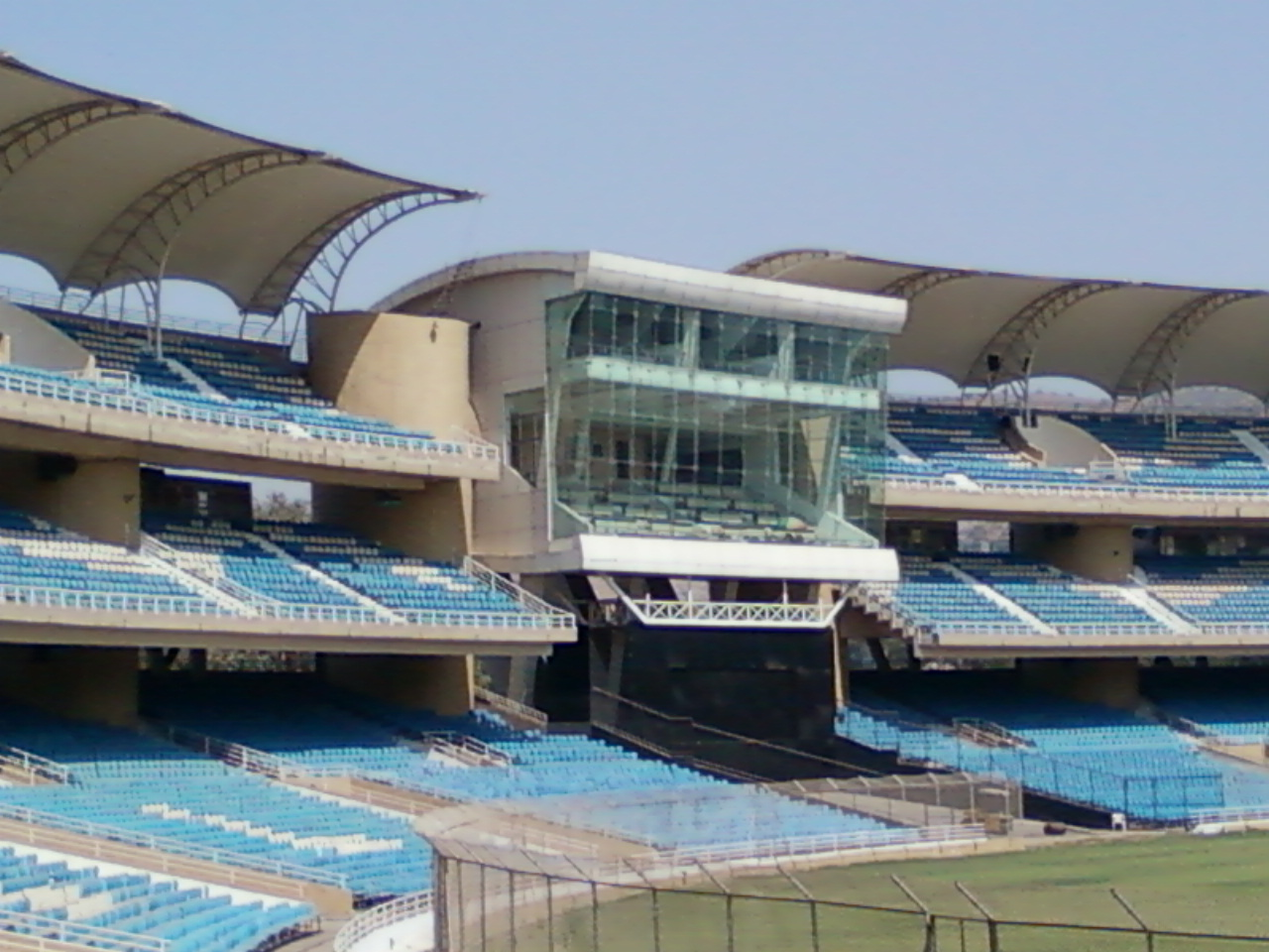 DR. D Y PATIL STADIUM, NERUL, NAVIMUMBAI